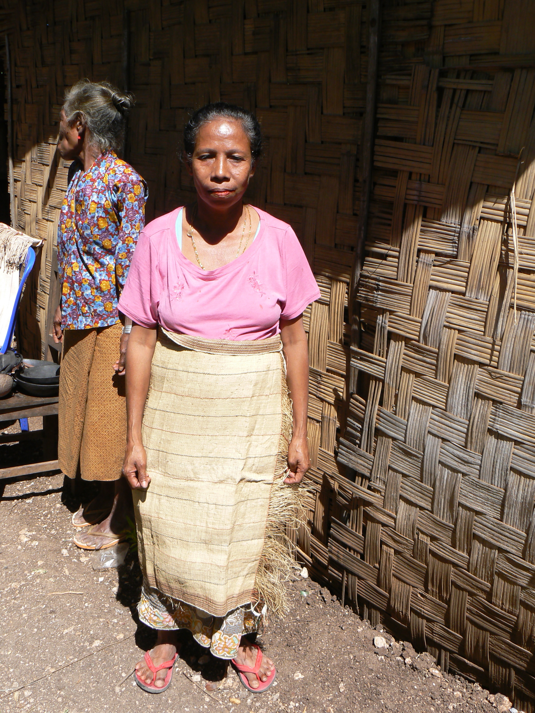 Frau in Macadade, Atauro mit Rock aus Naturfassern.